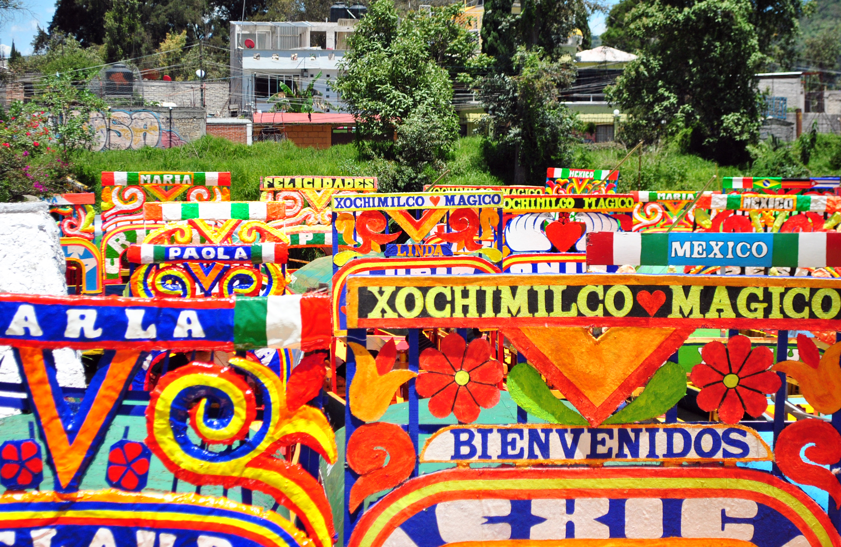 Trajineras en el embarcadero nuevo de Nativitas